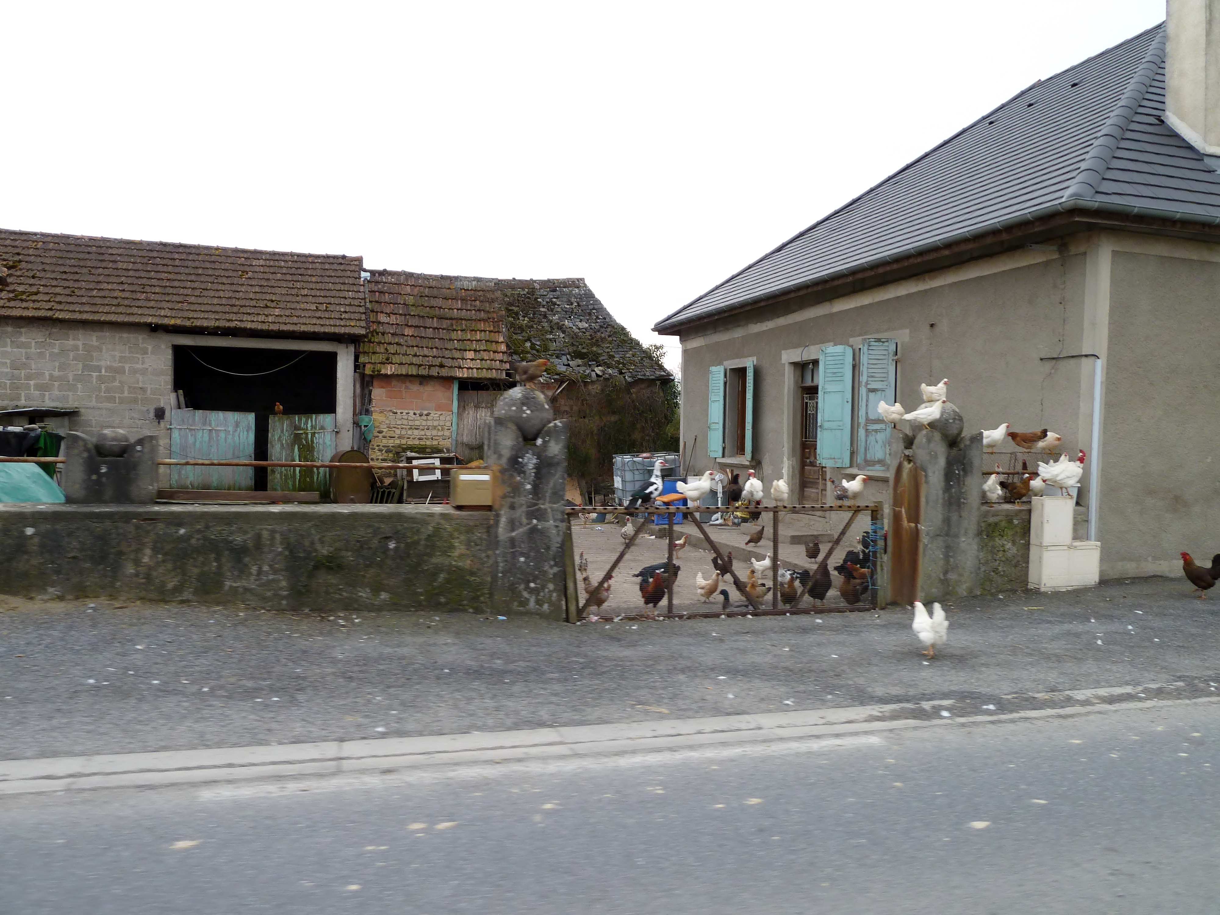 Ferme à Auriac (Pyrénées-Atlantiques)